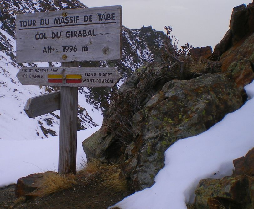 Photo Panneau Col de Girabal, pic Saint Barthélémy, Ariège, 09 France